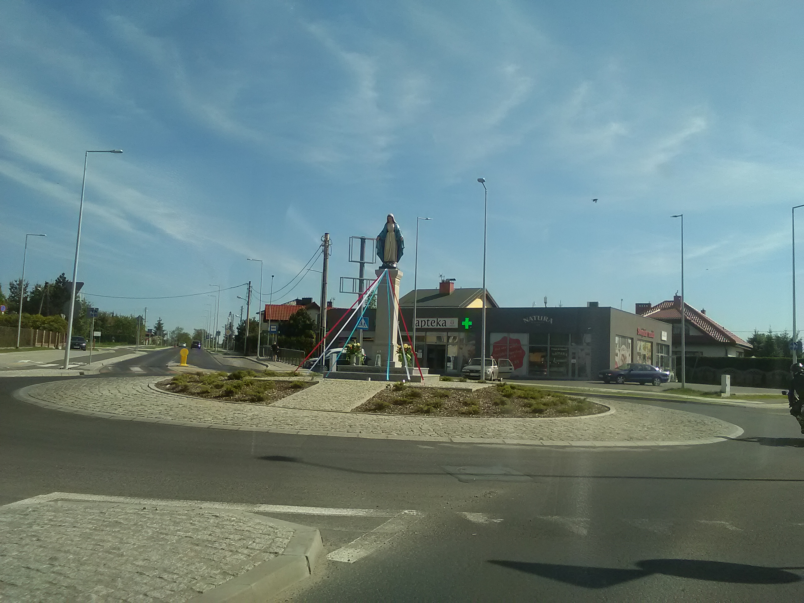 Nowowybudowane rondo na ulicy Starałęckiej i Głuszyna w Poznaniu.